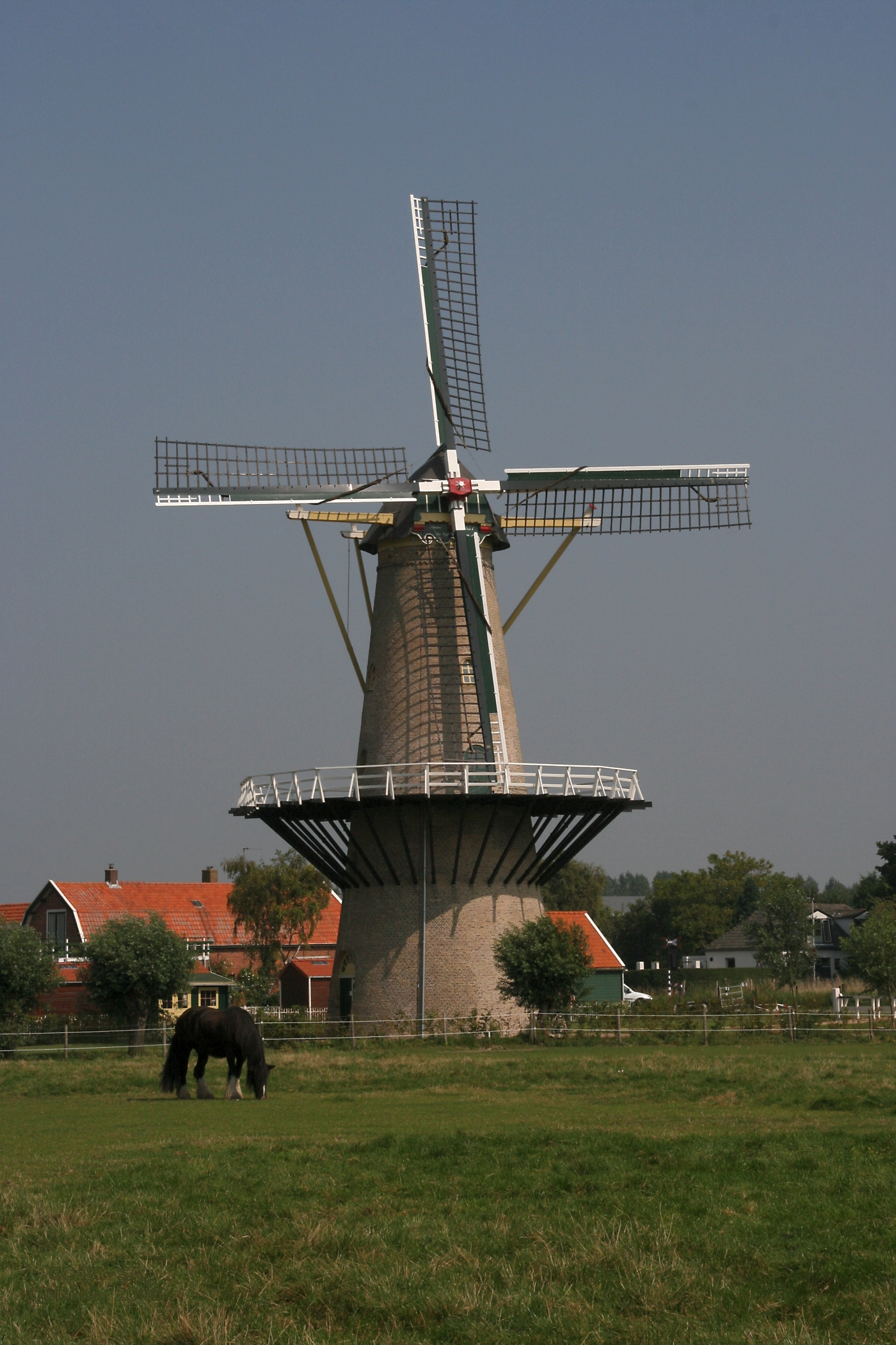 Heinkenszand: molen De Vijf Gebroeders